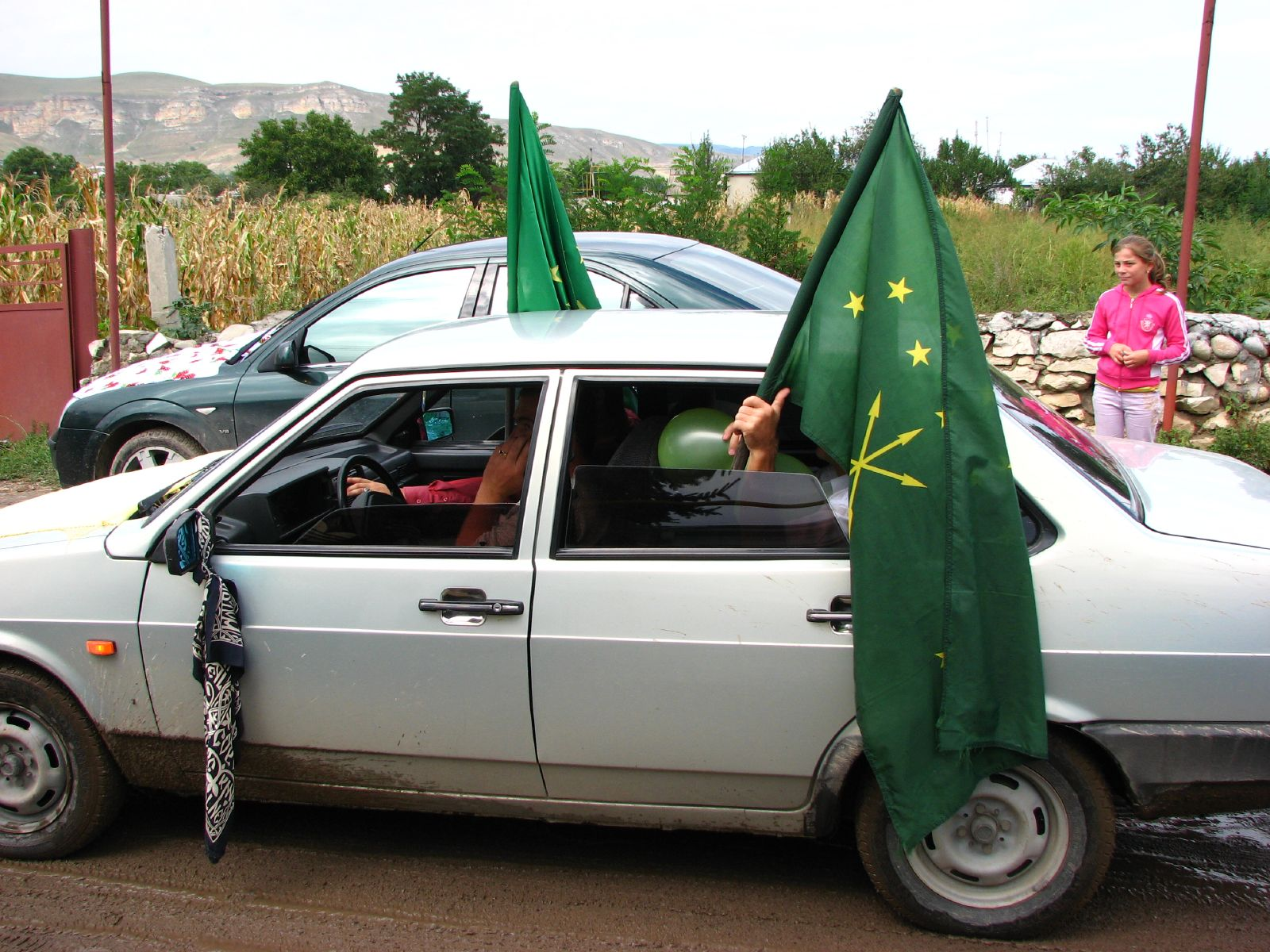 Черкесы!